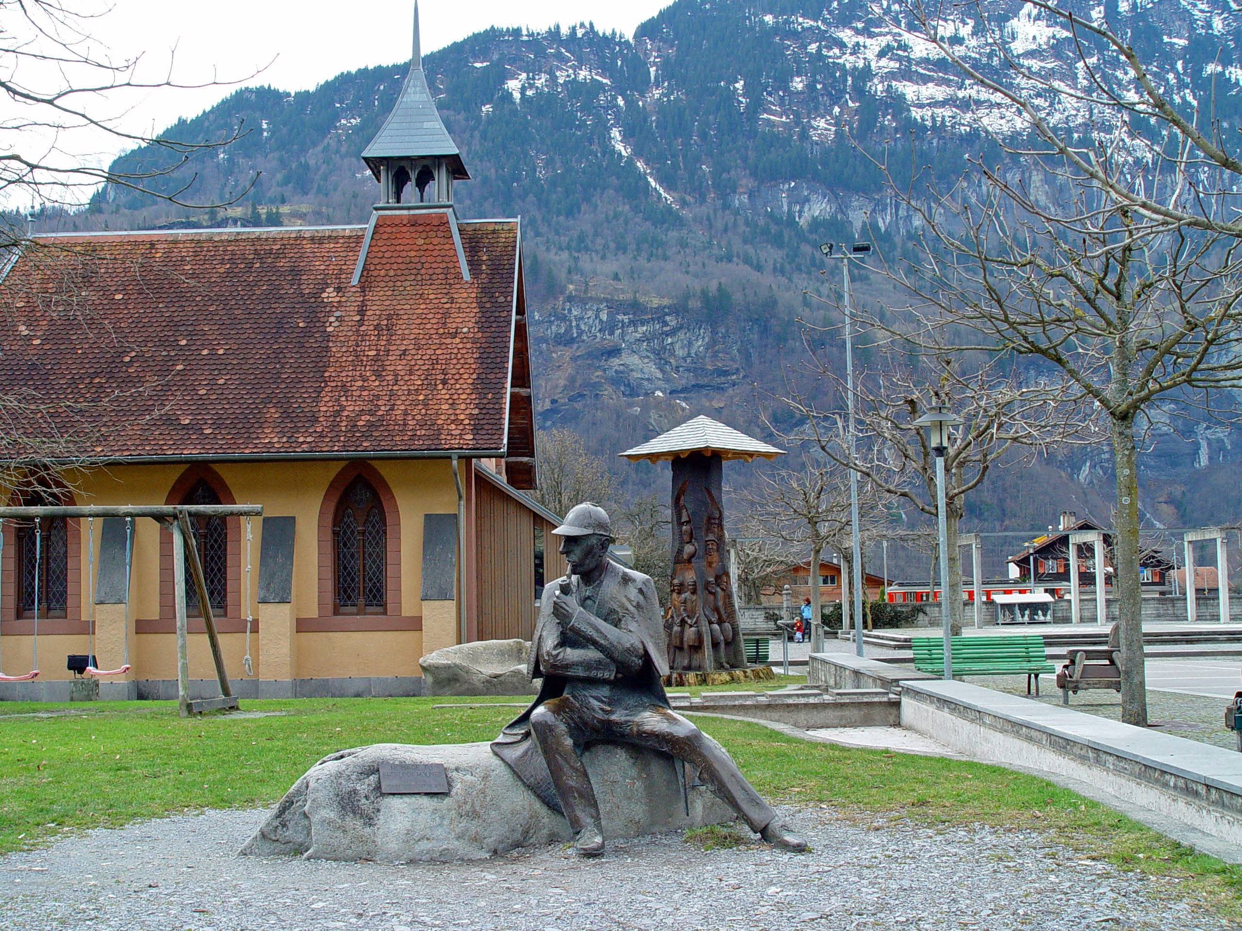 Statue von Sherlock Holmes in Meiringen mit Englischer Kapelle im Hintergrund links